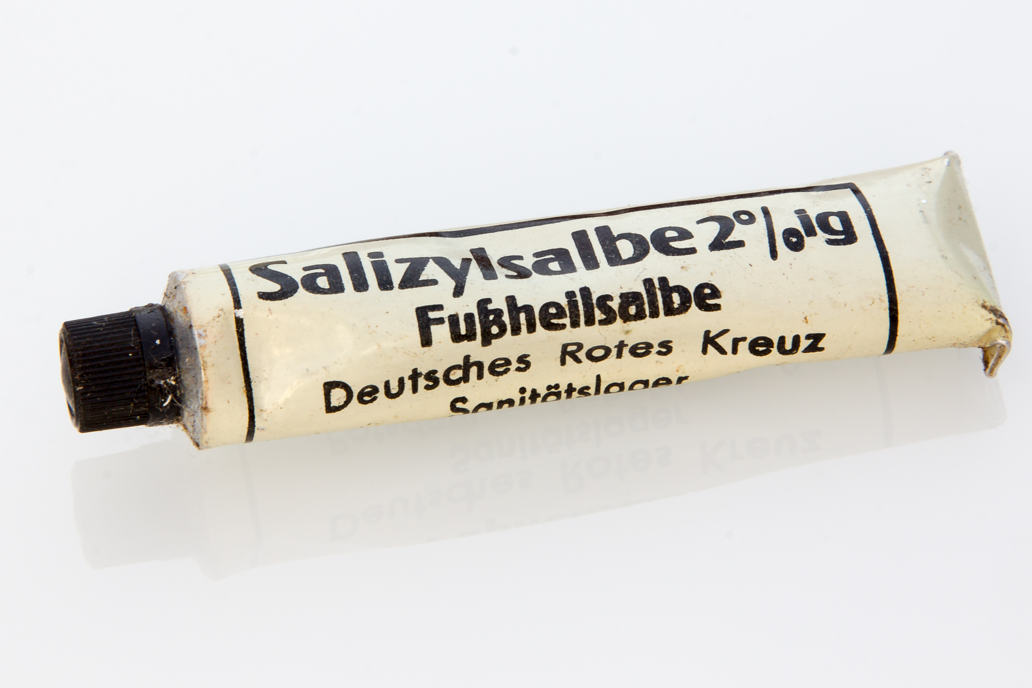 Salizylsalbe des Deutschen Roten Kreuzes, aus einer Rotkreuzhelfertasche der 1930er Jahre